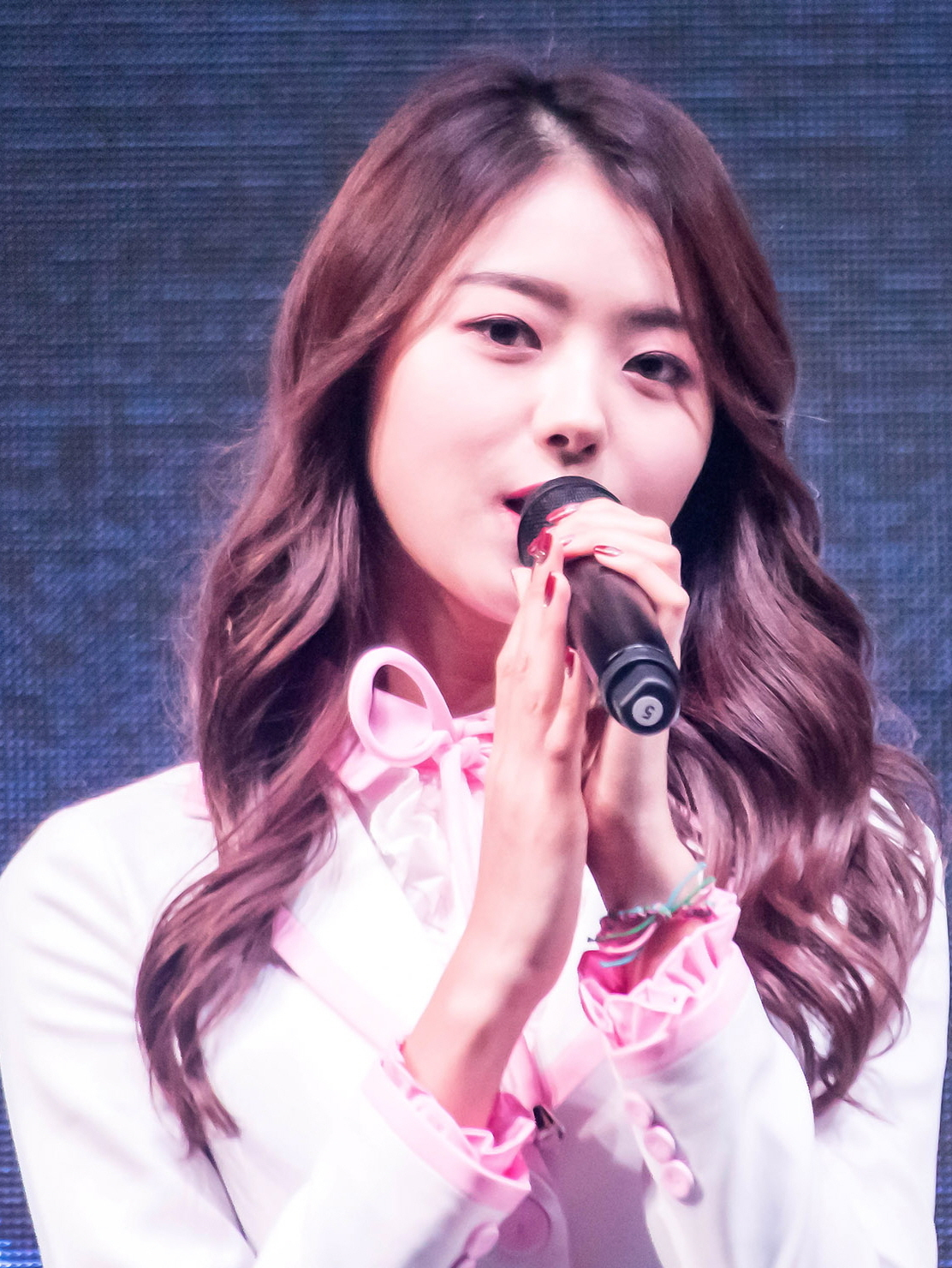 161219 불빛거리 출정식 아이오아이 직찍 업로드